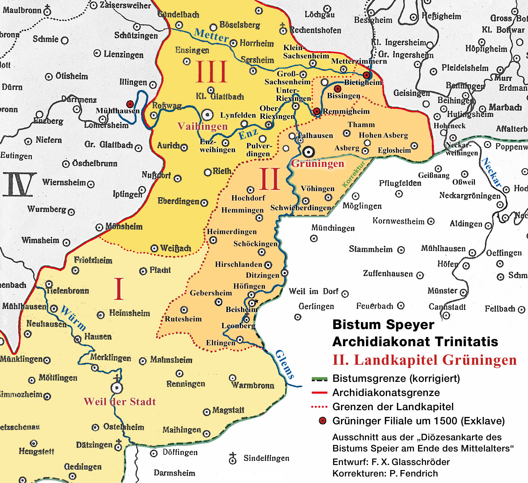 Landkapitel Grüningen im Archidiakonat Trinitatis des Bistums Speyer (15. Jhdt.). Kartenvorlage von Franz X. Glasschröder (1906). Korrekturen: Schwieberdingen und Vöhingen (Wüstung) integriert; Grüninger Filialen in der Exklave ergänzt: Mühlhausen, Remmigheim (Wüstung, verlagert nach Untermberg), Bissingen und Bietigheim. Grüninger Filiale "St. Johann" bei Talhausen sowie die Wüstungen Pulverdingen und Aicholtz westlich von Grüningen ergänzt.